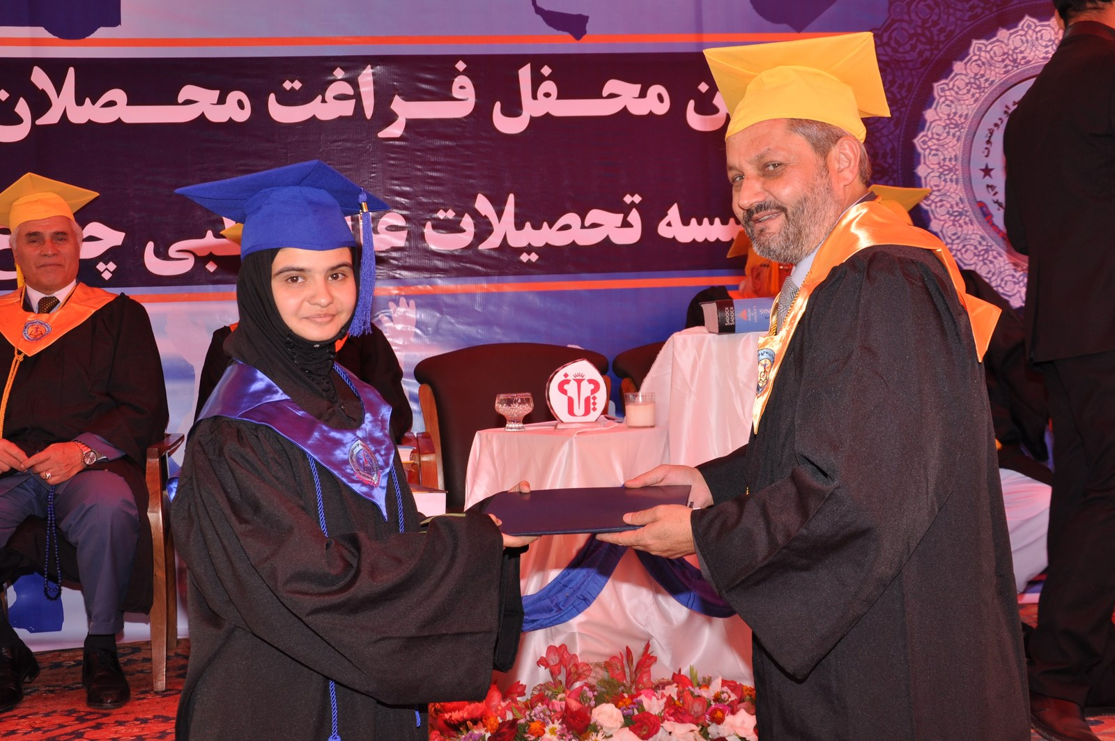 محترم داکتر فیروز الدین فیروز وزیر صحت عامه افغانستان در حال توزیع تصدیقنامه های فارغان فاکولته طب معالجوی